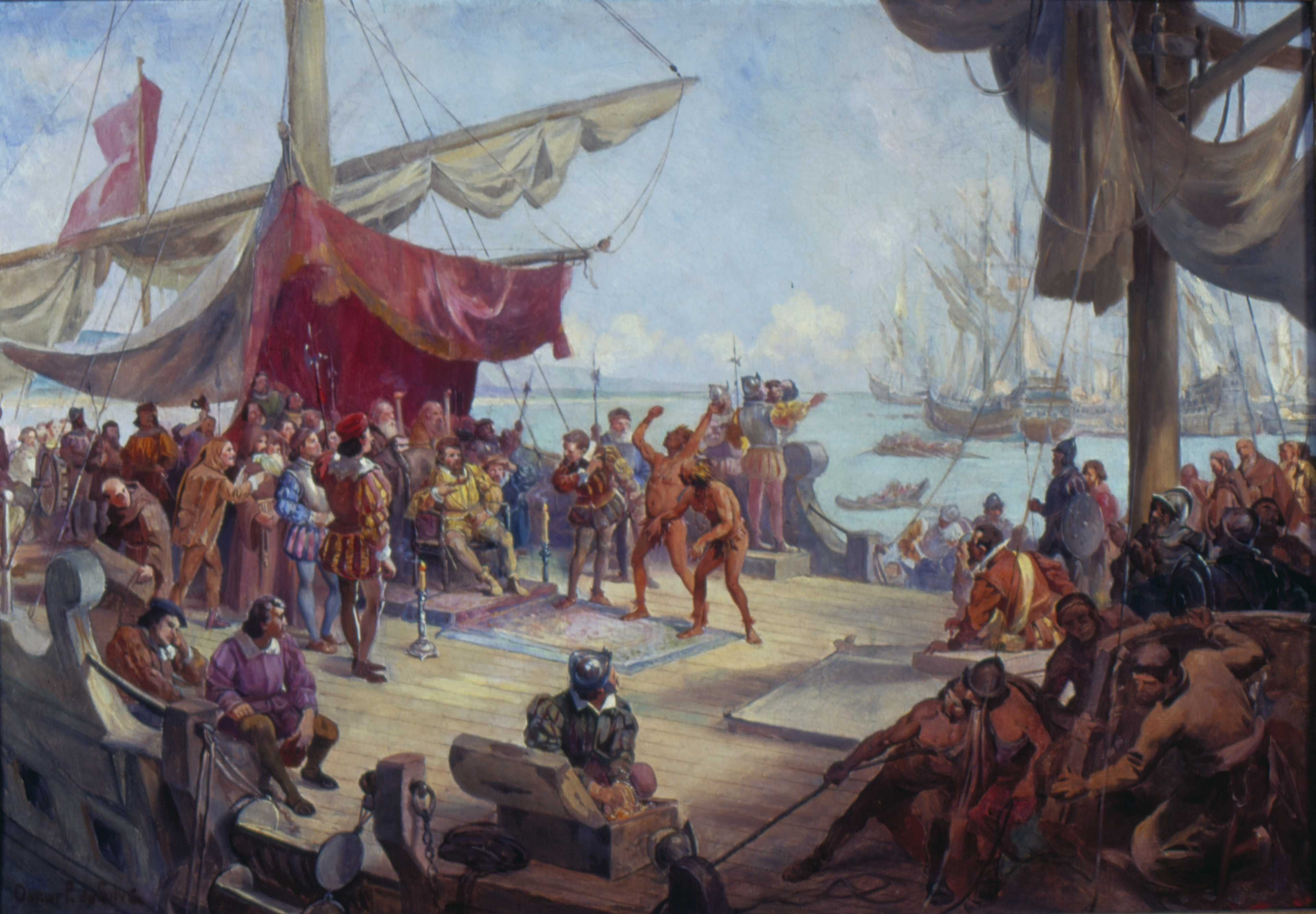 Obra que integra o acervo do Museu Paulista da USP. Coleção Fundo Museu Paulista - FMP